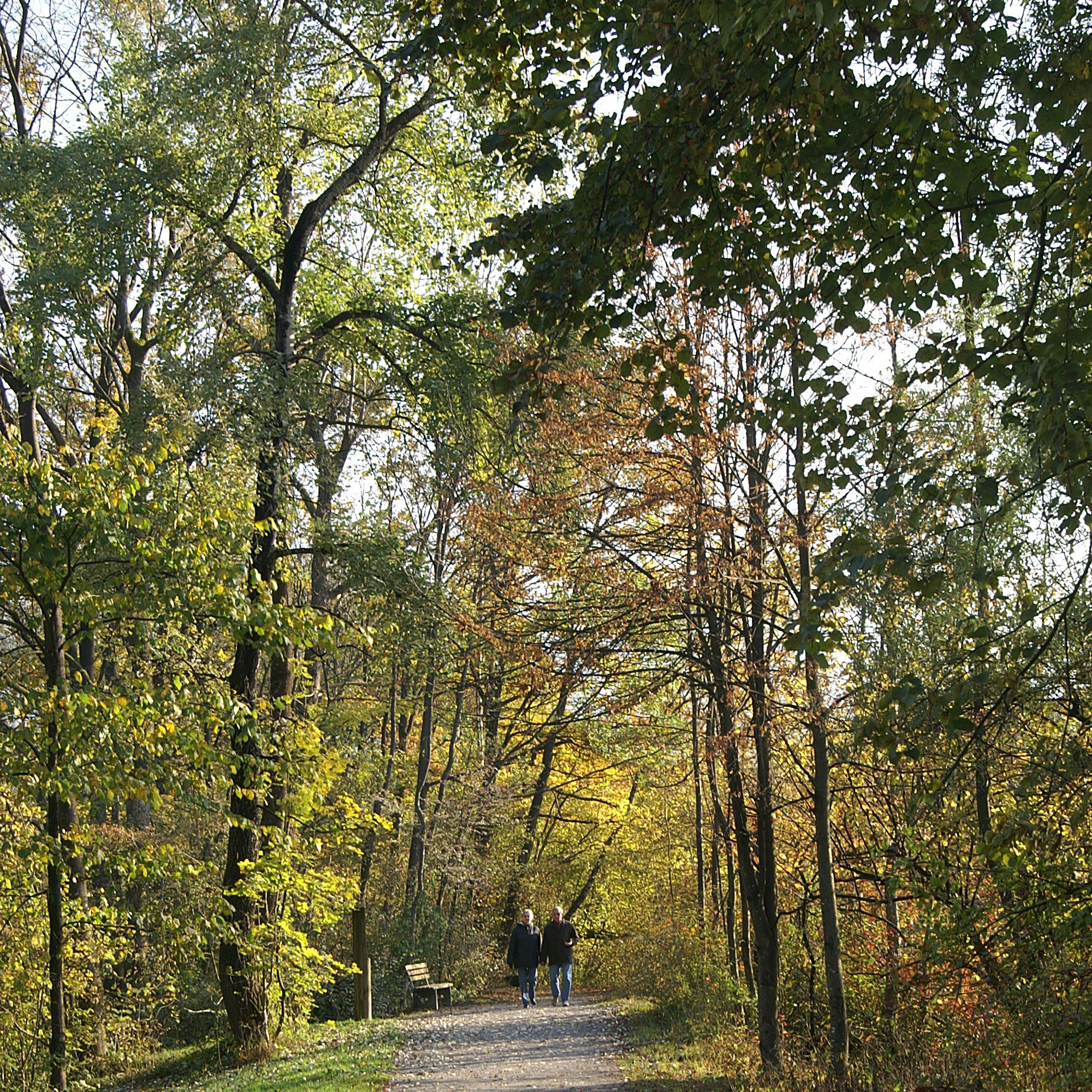 Naherholung am Damm der Dornbirner Ache im Stadtgebiet Rohrbach, Dornbirn